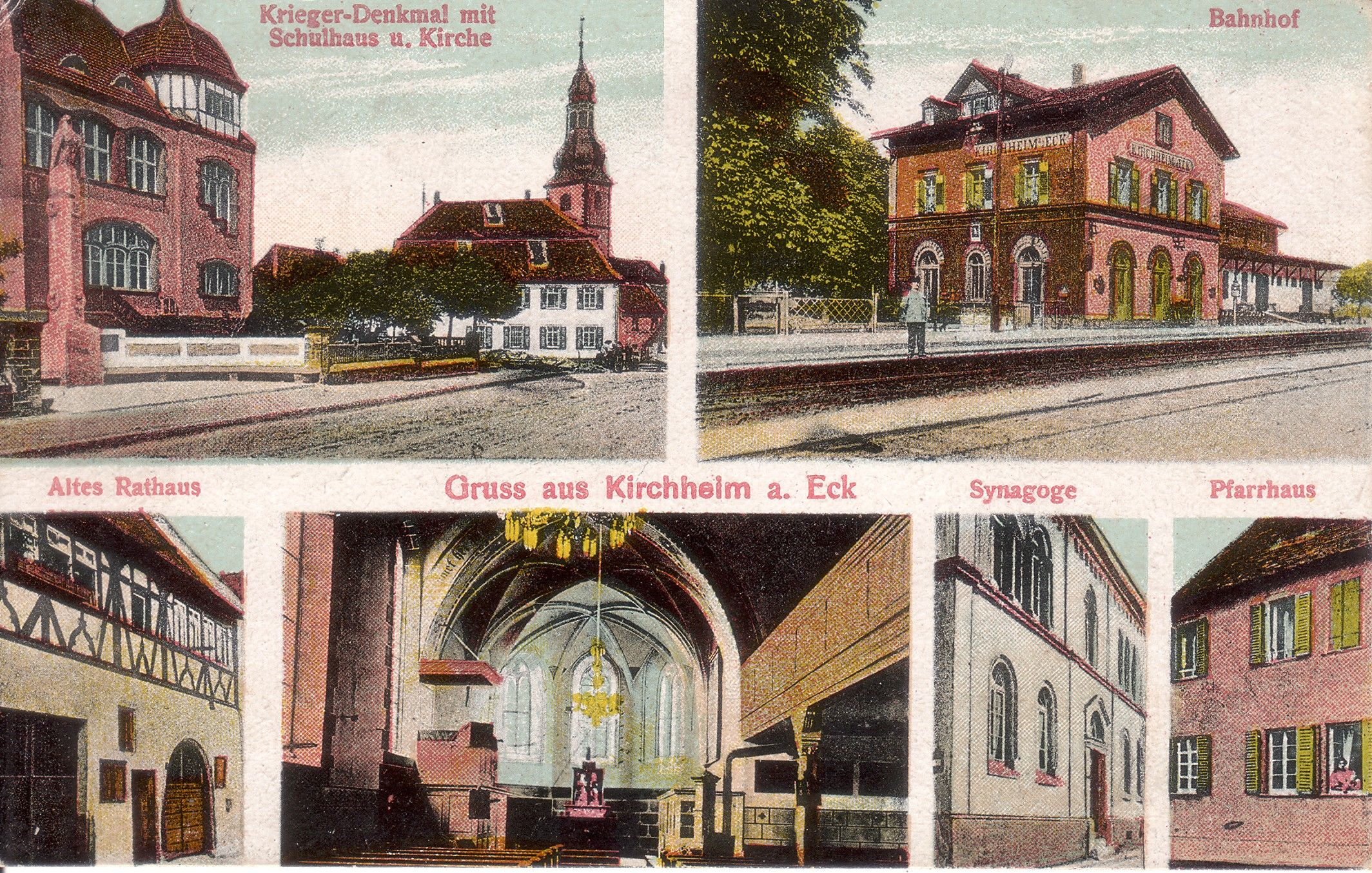 Ansichtskarte von Kirchheim an der Weinstraße